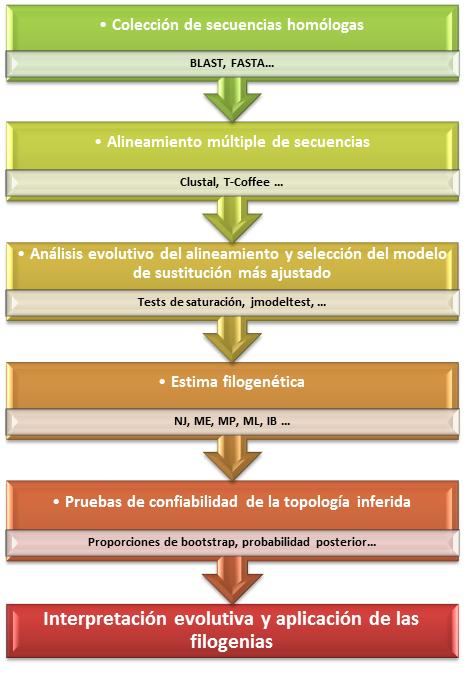 Metodología empleada en análisis filogenético de secuencias moleculares